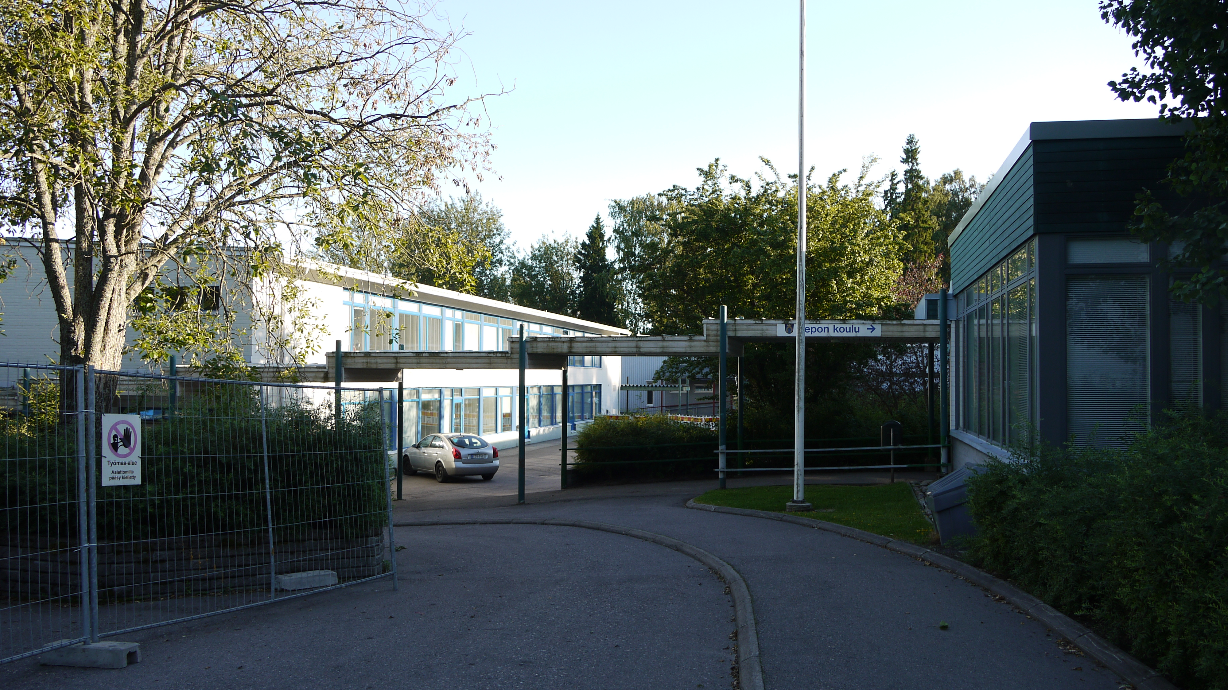 Sepon koulu Espoon Pohjois-Tapiolassa